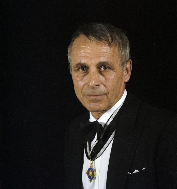 27.5.1991 Prof. Dr. Albrecht Schöne Germanist, Göttingen Mitglied des Ordens Pour le Mérite für Wissenschaften und Künste